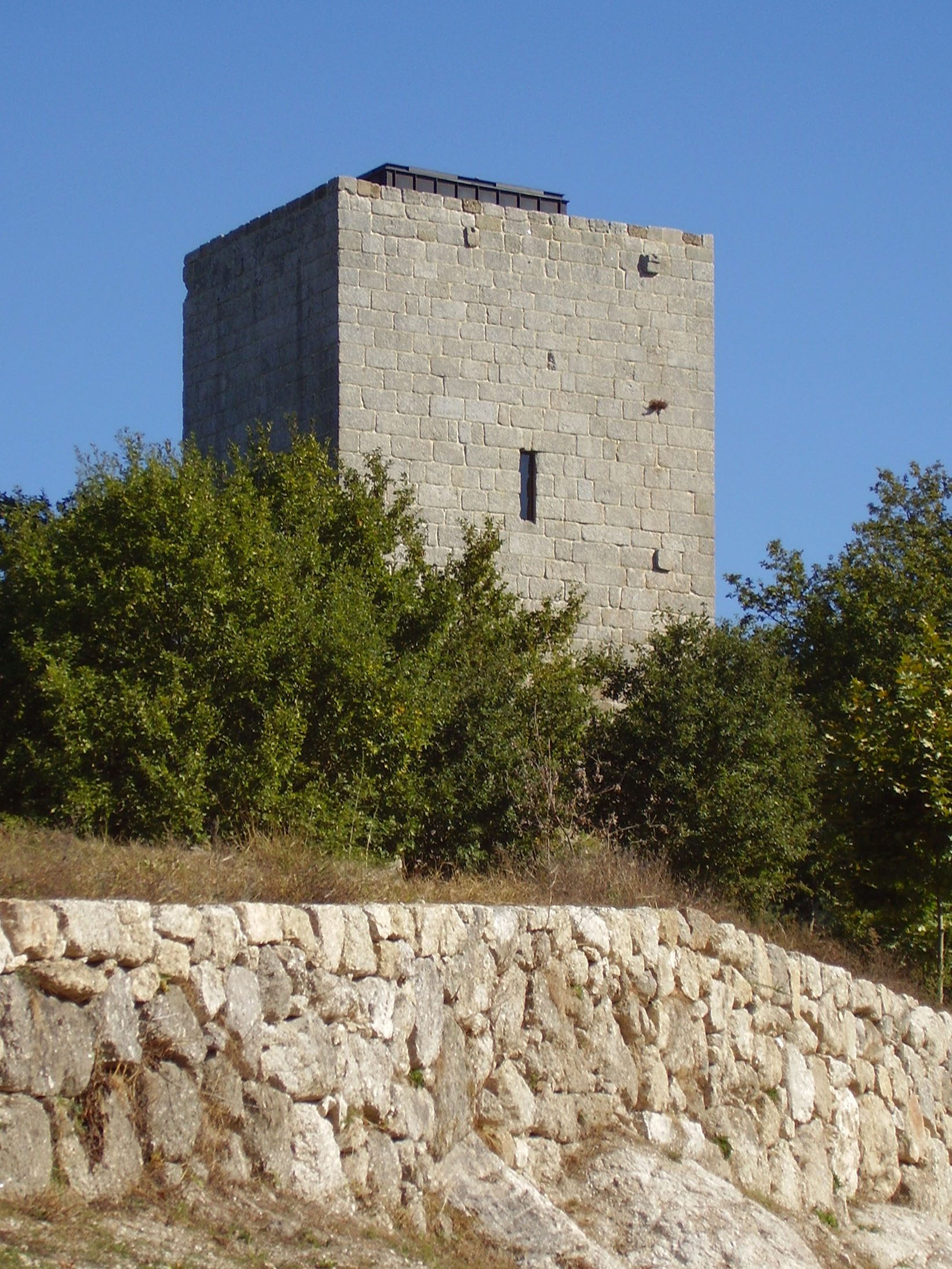 Torre de Vilar, Lugar da Torre, Vilar do Torno e Alentém, Lousada